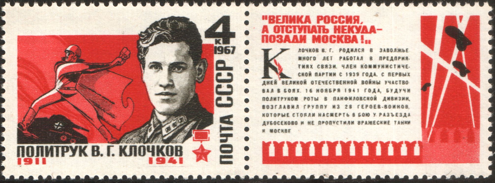 Герой Советского Союза, политрук В. Г. Клочков (1911-1941). Художник: П. Бендель. Марка СССР, номинал - 4коп.